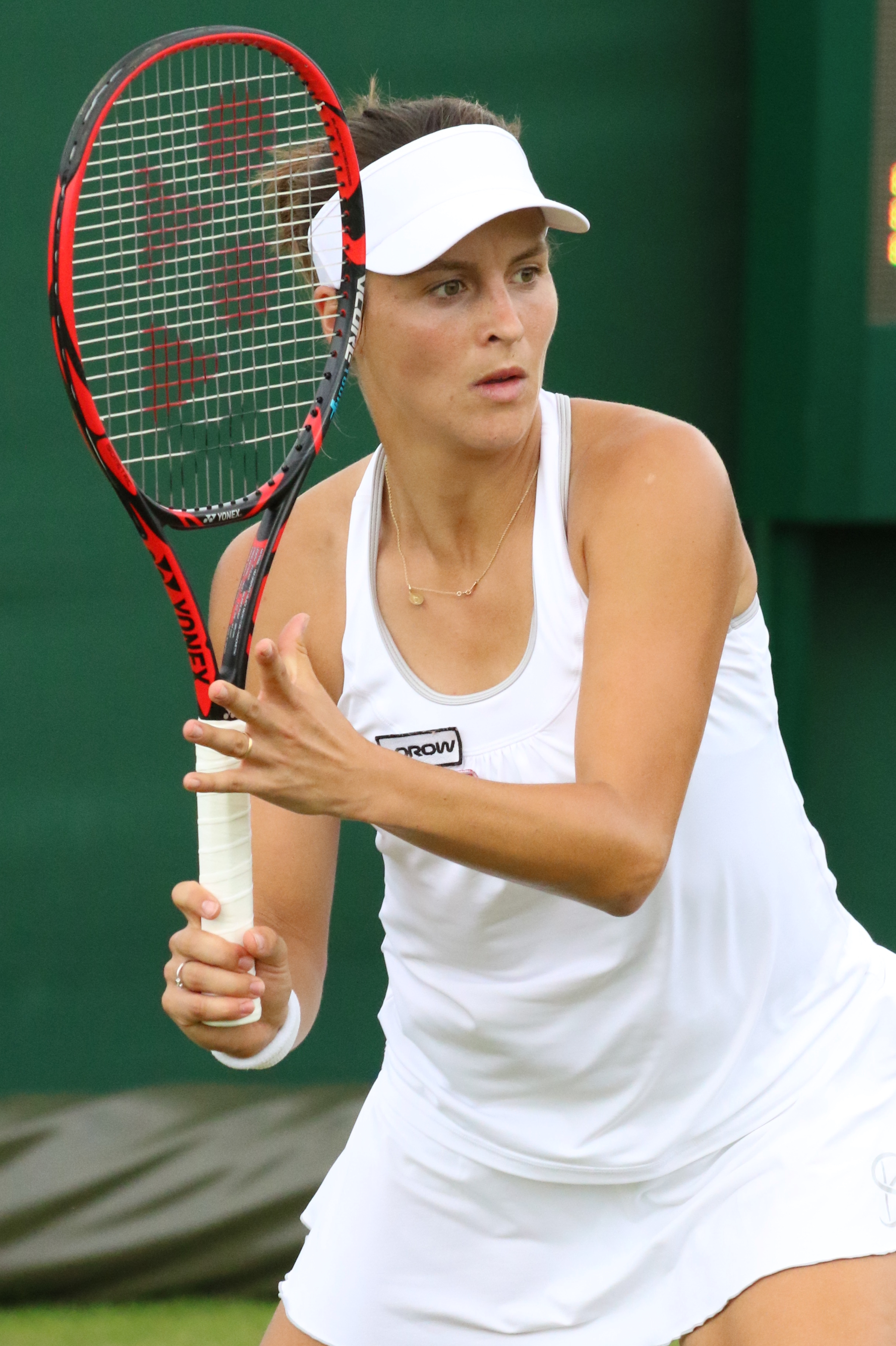 Maria WMQ16 (5)